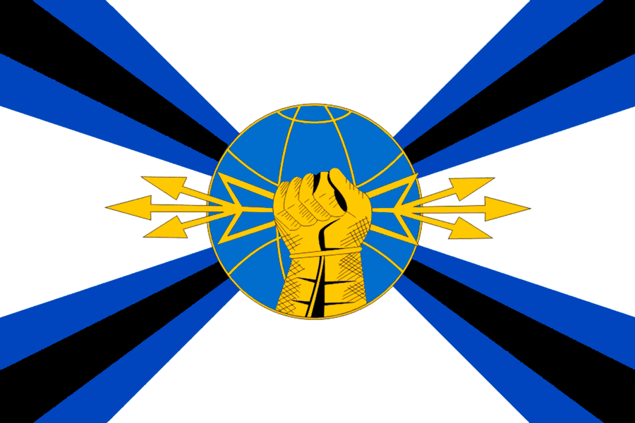 Флаг войск радиоэлектронной борьбы, Россия